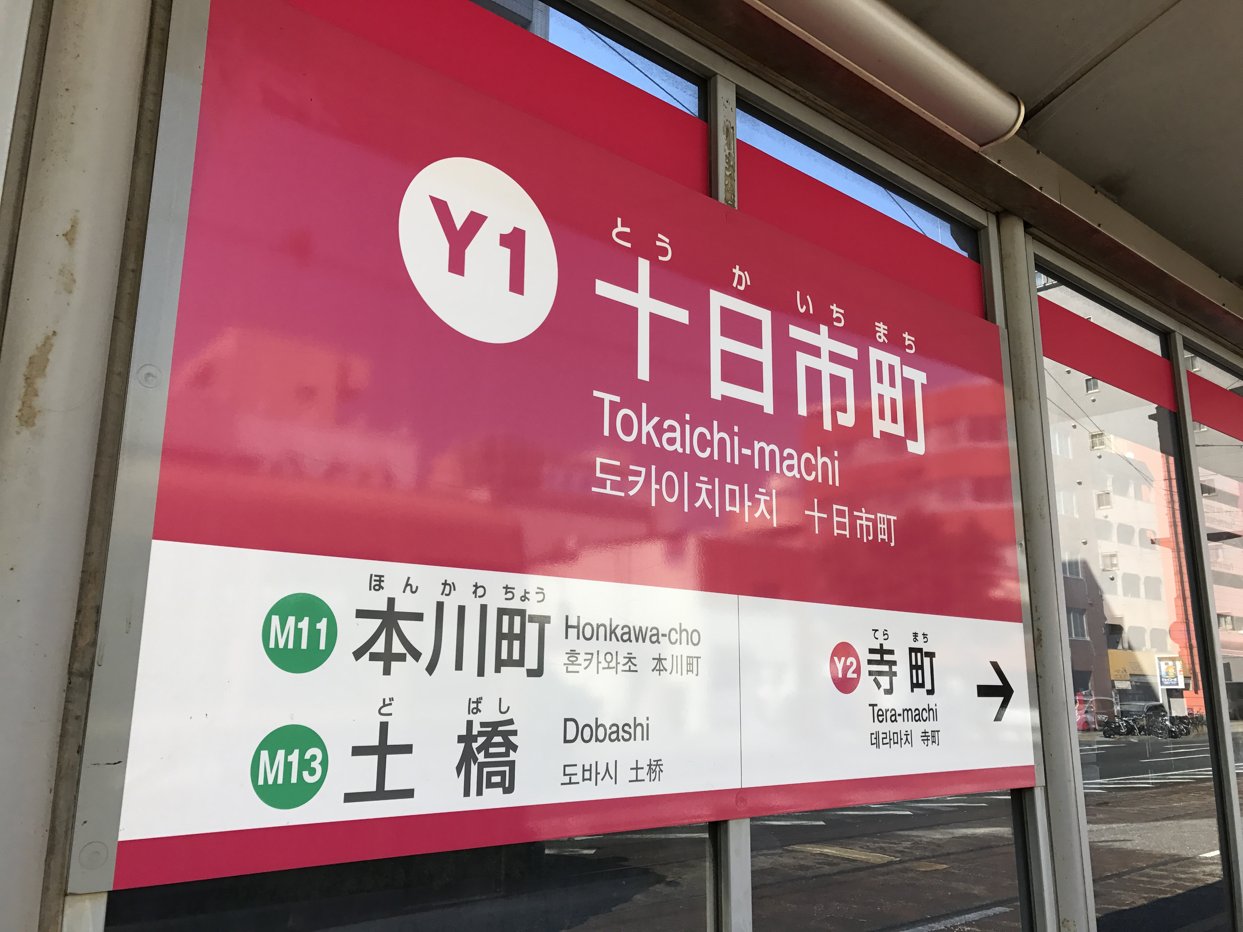 十日市町停留場(横川線)の駅名標